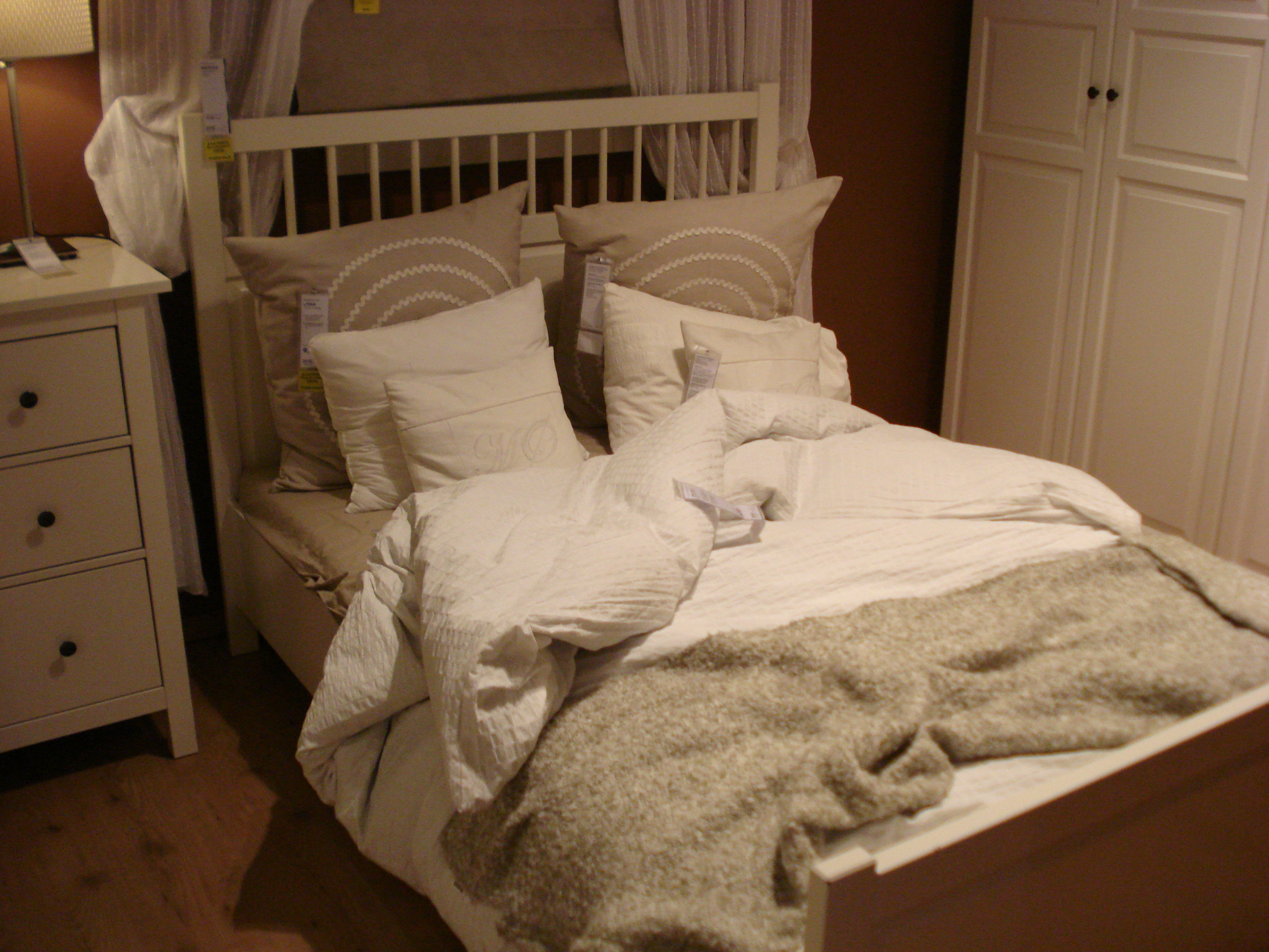 Un amor ficticio en IKEA